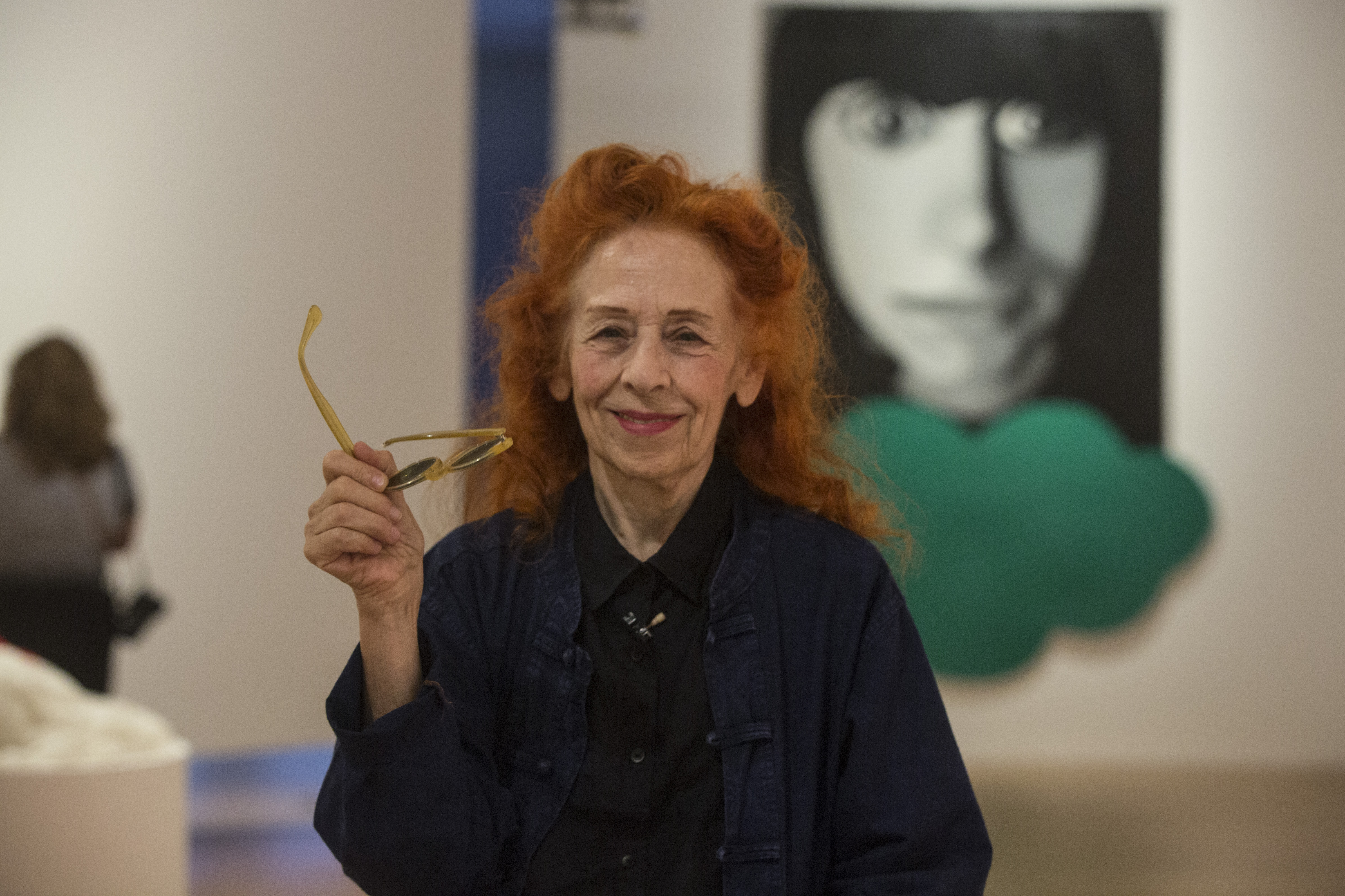 Buenos Aires, 19 de Diciembre de 2018. Reportaje fotográfico a la artista Delia Cancela, Premio Nacional Trayectoria Artística. Cancela realiza una exhibición en el Museo de Arte Moderno de Buenos Aires: "Reina de Corazones: 1962-2018". Su obra, consagrada a la condición femenina desde una visión romántica, se despliega en el espacio y se manifiesta en una atmósfera íntima y apasionada. Fotos: Silvina Frydlewsky / Secretaría de Cultura de la Nación.